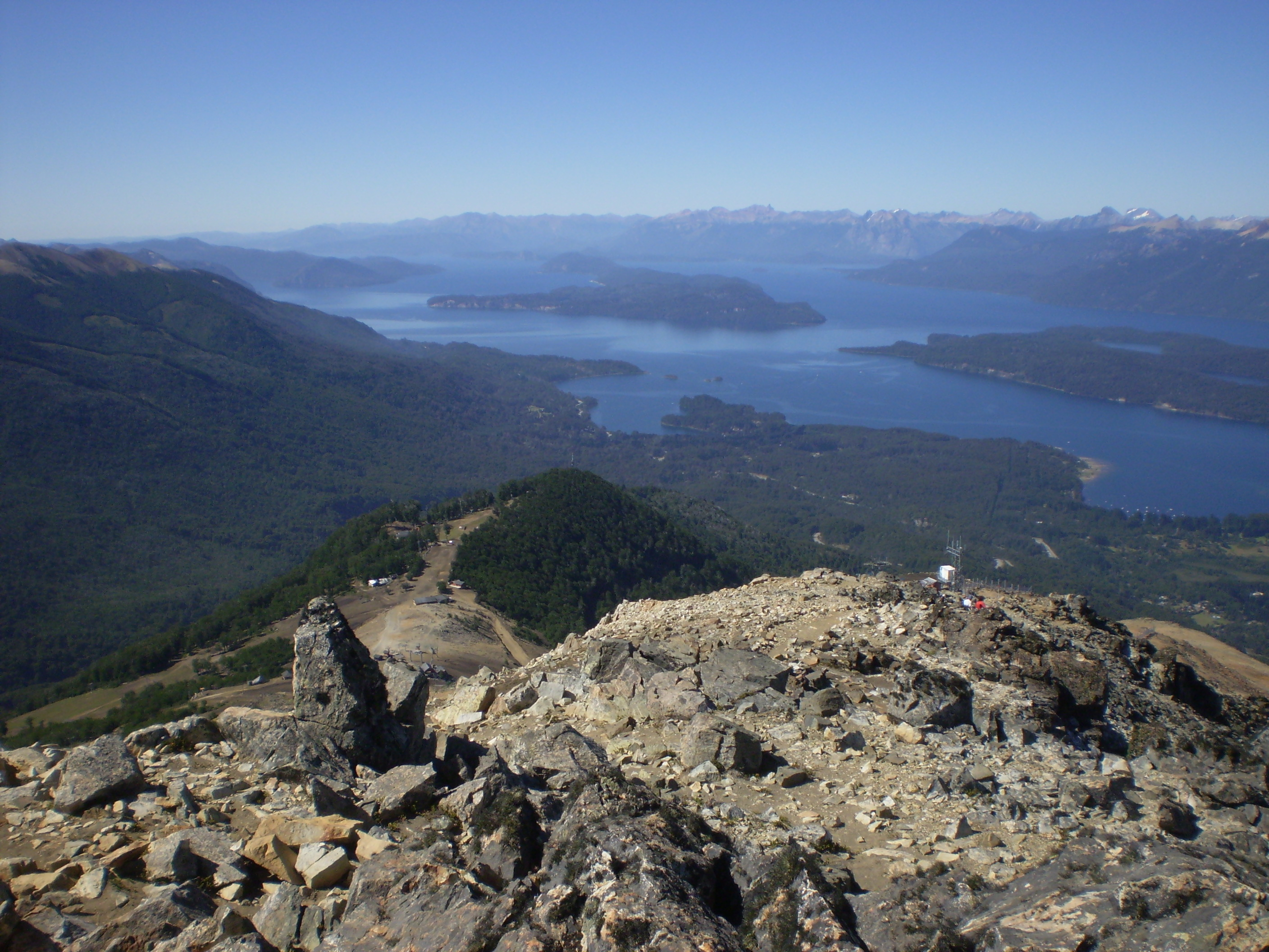 (Lago Nahuel Huapi desde la cumbre del cerro Bayo) Villa La Angostura, Neuquén, Argentina. Se distingue en la fotografía:Lago Nahuel Huapi, al centro bahía Manzano, Izquierda la Isla Victoria y a la derecha el extremo de la península de Quetrihué, fondo el cerro Catedral de San Carlos de Bariloche.